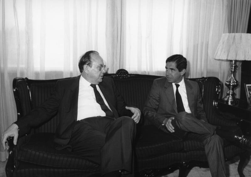 San José, 9. April 1987 Am 7. April 1987 startete der Bundesminister des Auswärtigen, Hans-Dietrich Genscher, zu einer Reise nach Mittelamerika. Vom 7. bis 9.4. besuchte er Venezuela und vom 9. bis 13.4. die Republik Costa Rica. Letzte Station seiner Reise war El Salvador. Am 14. April kehrte Bundesaußenminister Genscher nach Bonn zurück. Bundesaußenminster Genscher (li.) im Gespräch mit dem Präsidenten der Republik Costa Rica, Dr. Oscar Arias Sanchez, im Präsidialamt.